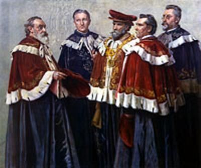 Rektor und Dekane der Universität Leipzig zu 500-jährigen Jubiläum